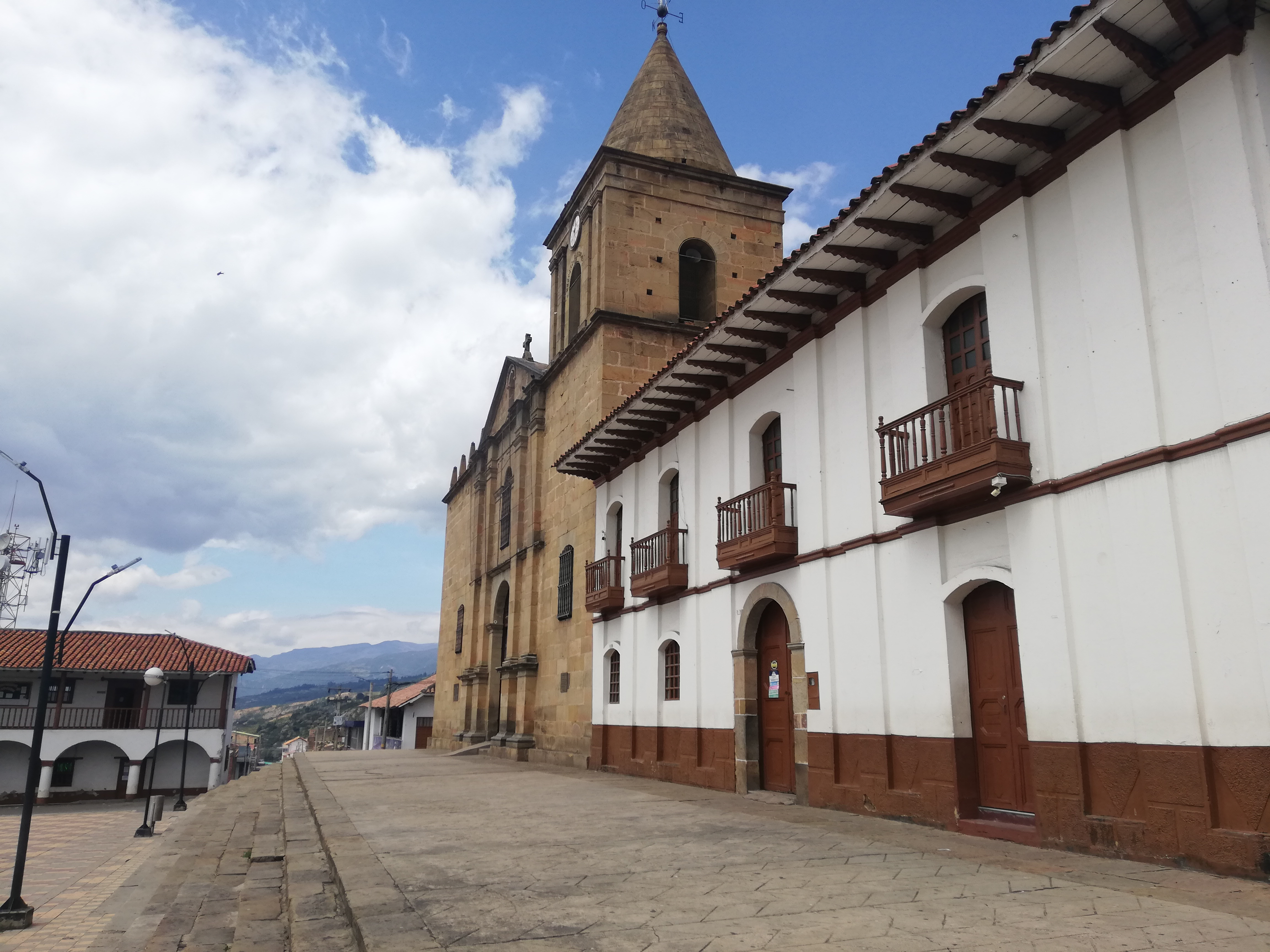 parroquia nuestra señora de la candelaria municipio de socha